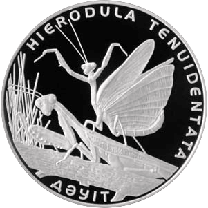 Богомол